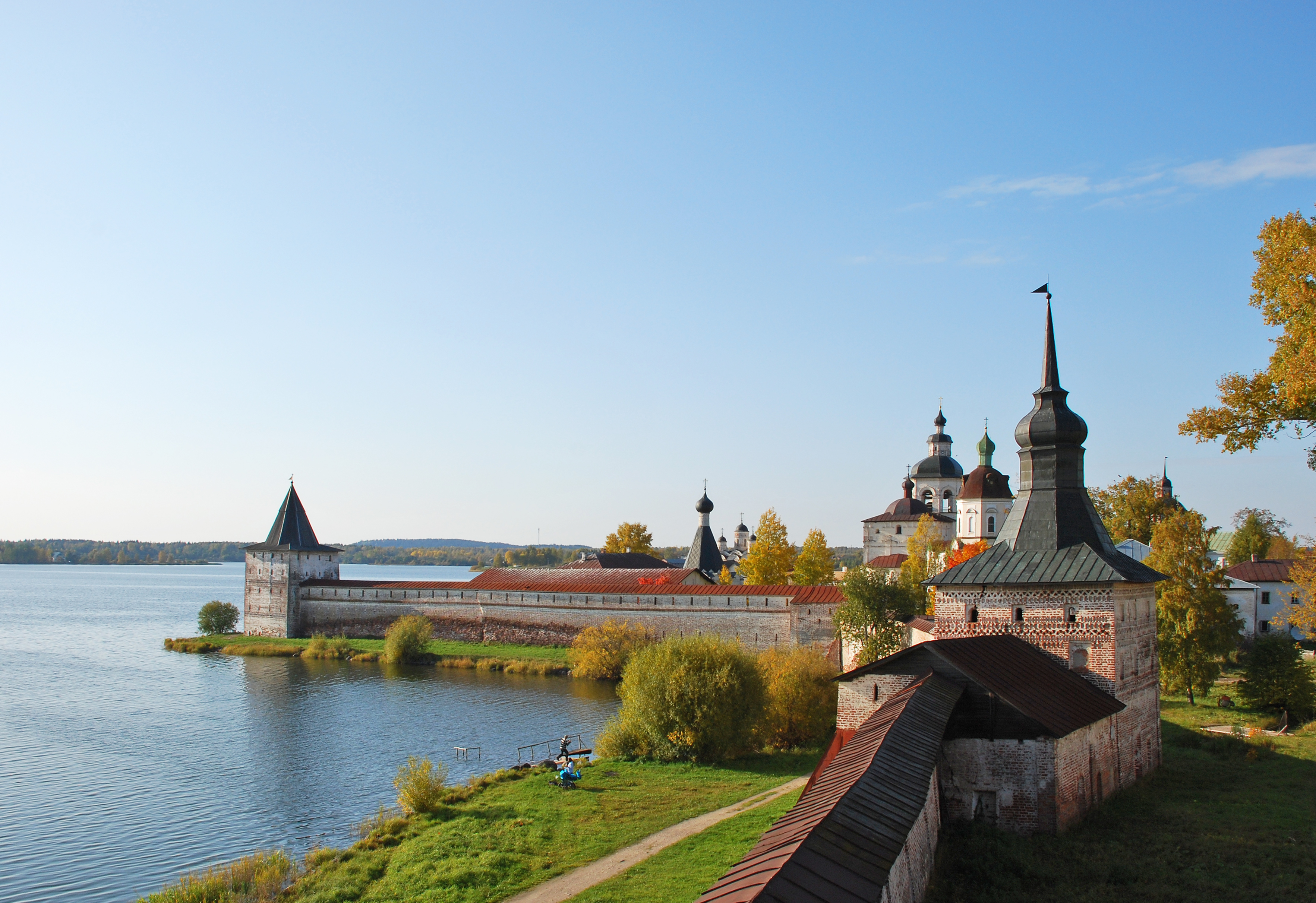 Ансамбль Кирилло-Белозерского монастыря (историко-архитектурный и художественный музей-заповедник) (Вологодская область, Кириллов, город Кириллов)